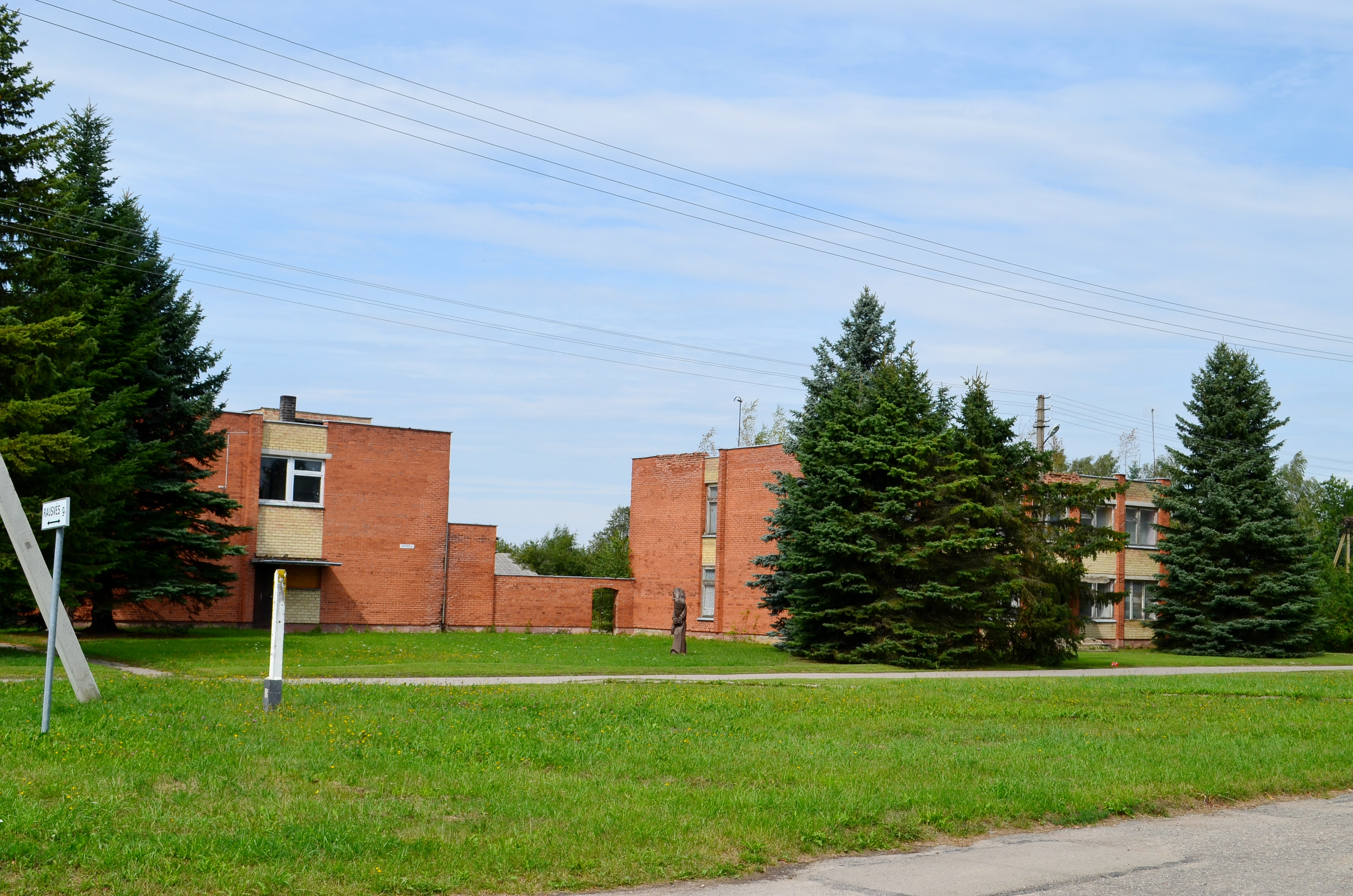 Ramoniškiai, Vilkaviškio raj.